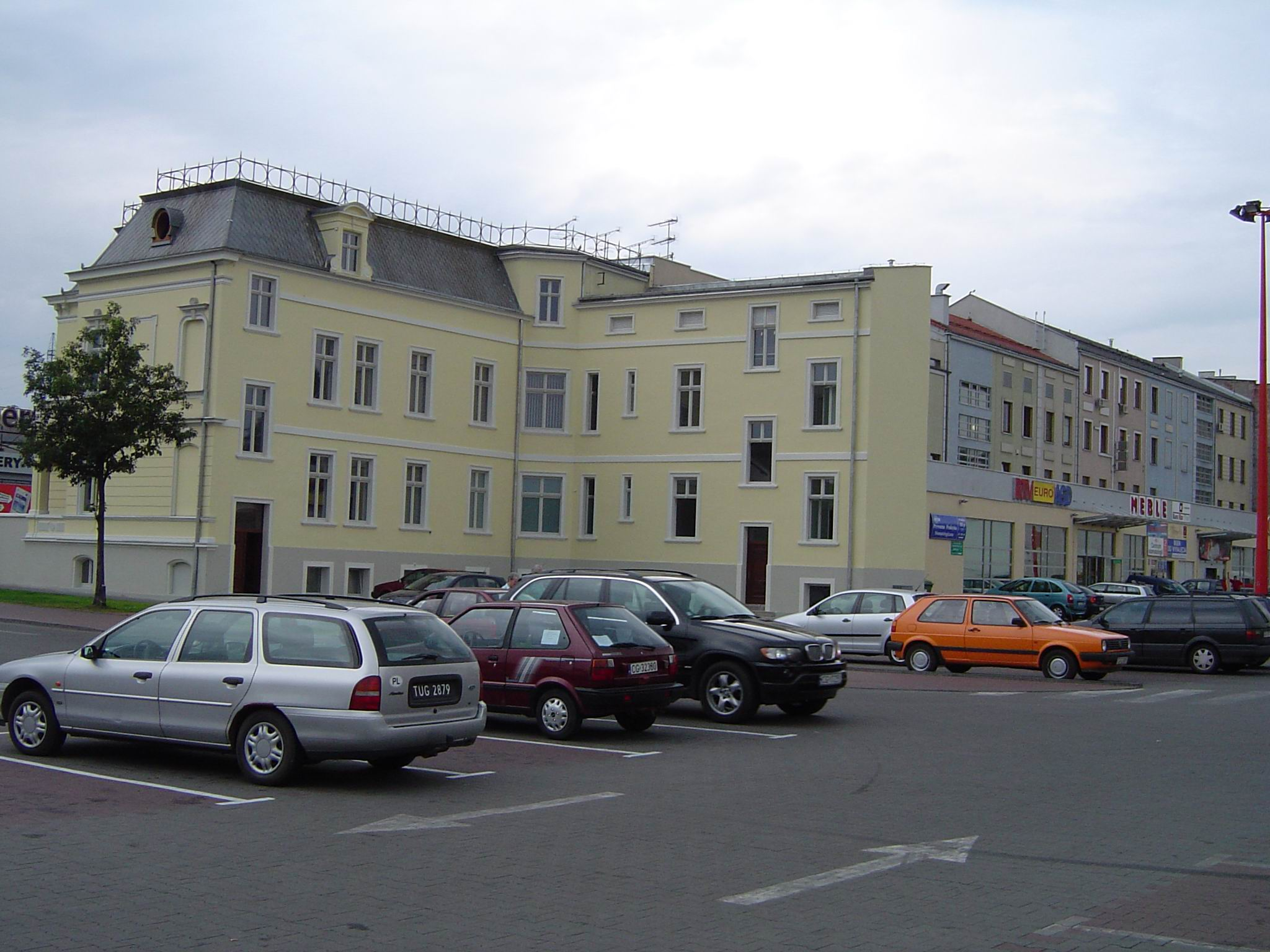 Kamienica, w której mieszkał wieloletni prezydent Grudziądza Józef Włodek przy obecnej ul. Włodka